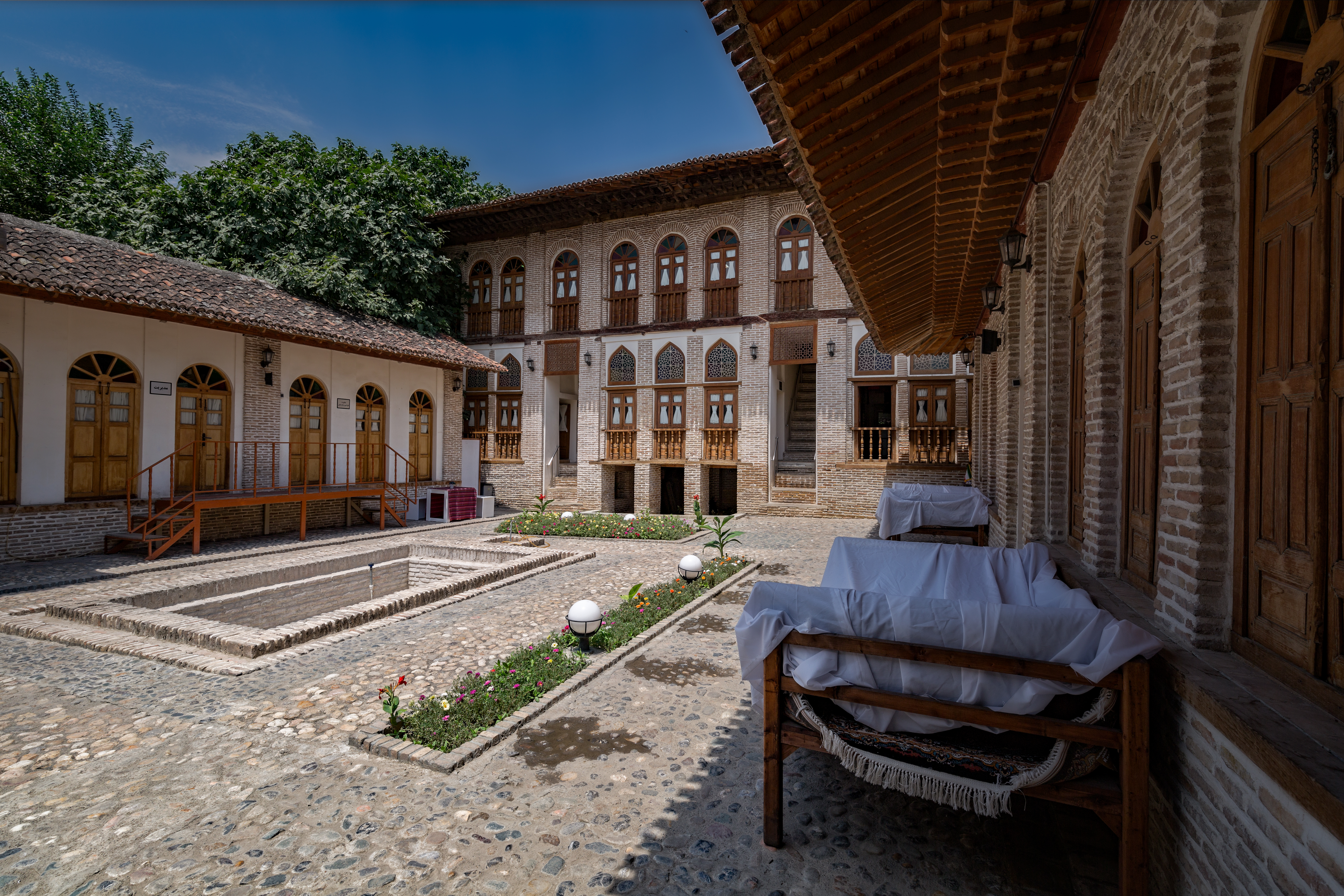 خانه امیر لطیفی